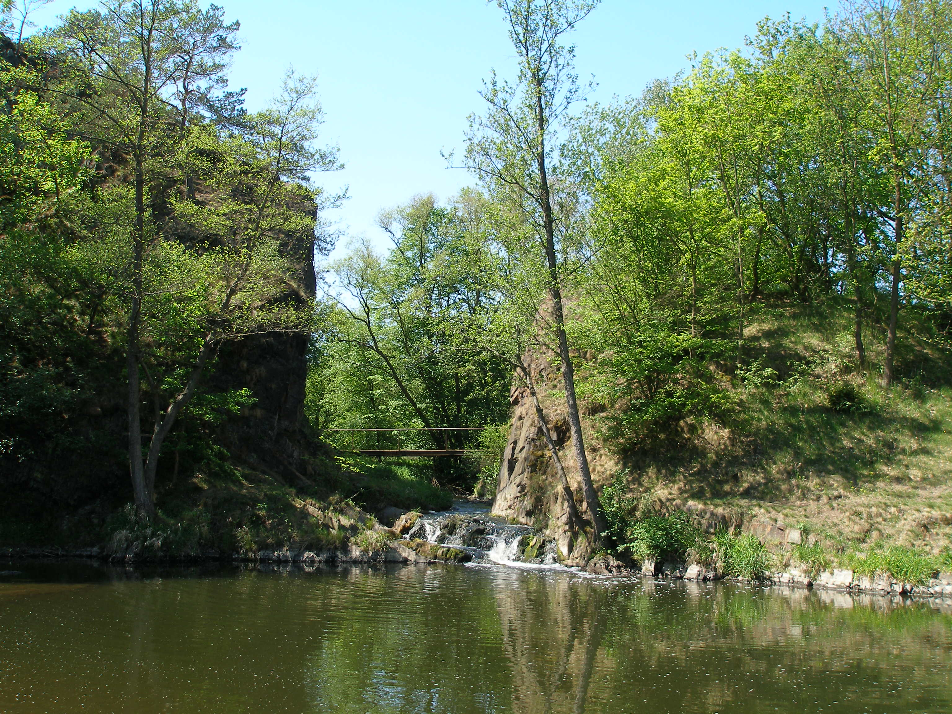 Kocába - průrva u Malé Lečice, pohled proti proudu